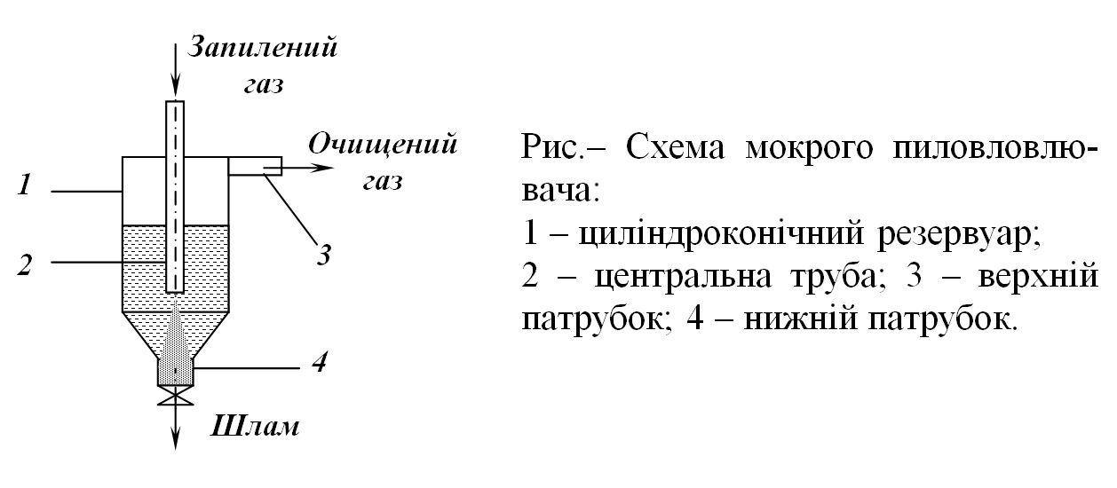 Схема_мокрого_пиловловлювача: Схема_мокрого_пиловловлювача